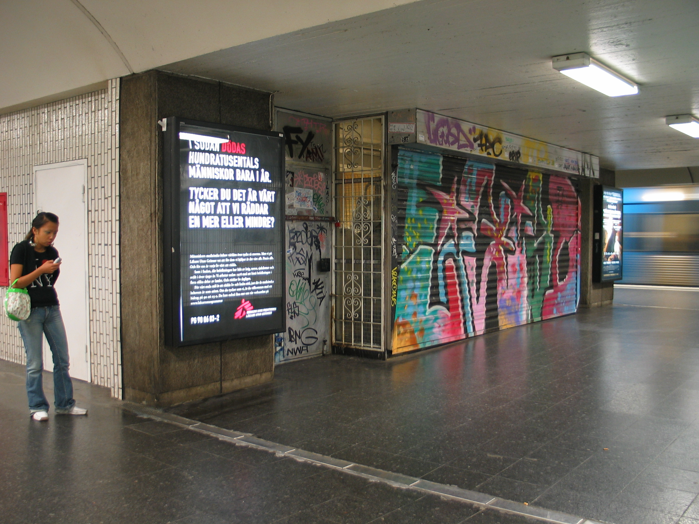 Karlaplan, a metro station in Stockholm, Sweden.